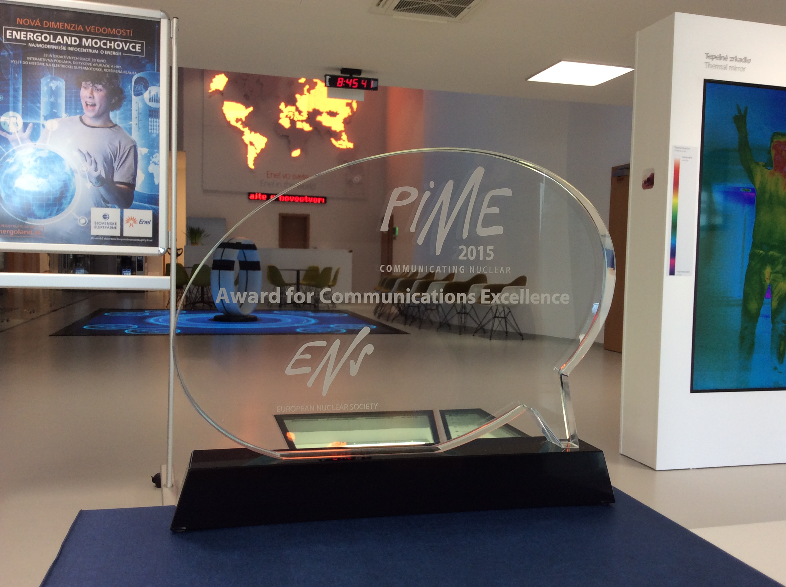 Ocenenie PIME 2015 pre Energoland.